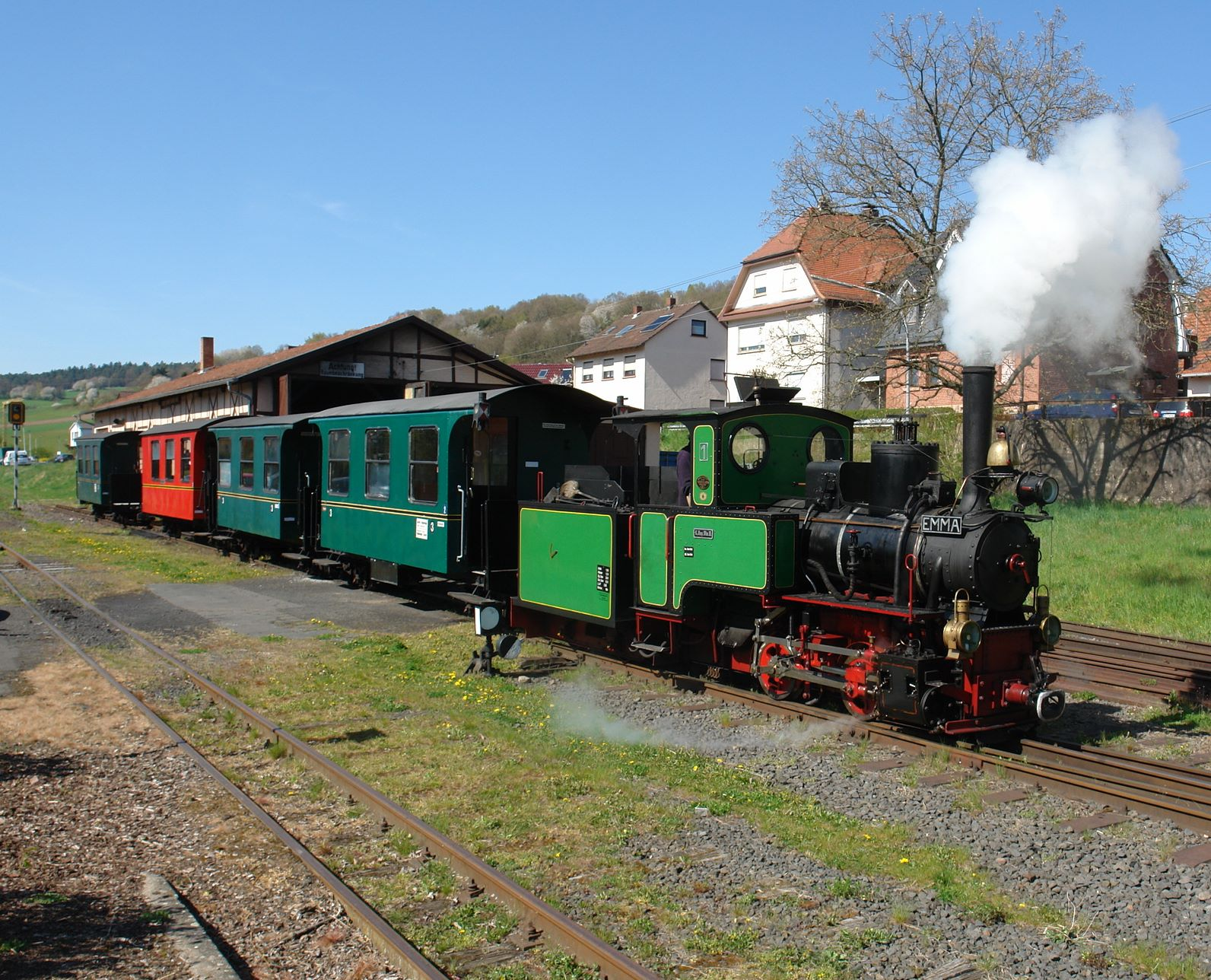 Die Bahnstrecke Wächtersbach–Bad Orb ist eine 6,5 km lange, heute schmalspurige Eisenbahnstrecke mit 600mm Spurweite (ursprünglich Normalspur), die im Bahnhof Wächtersbach beginnt und nach Bad Orb führt.